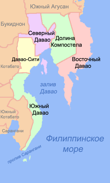 Карта провинций региона Давао (Филиппины)